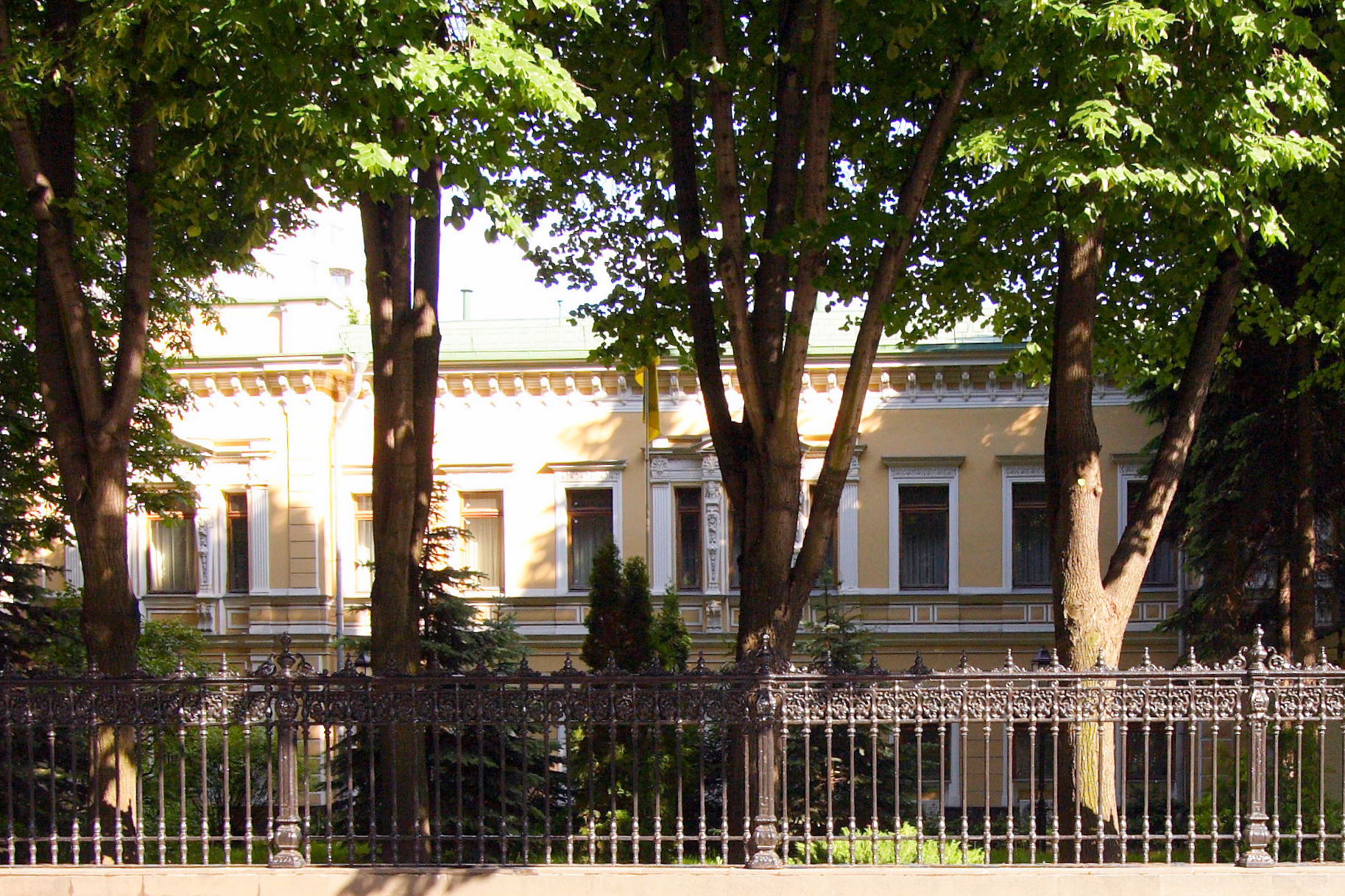 Консульство Украины в Москве